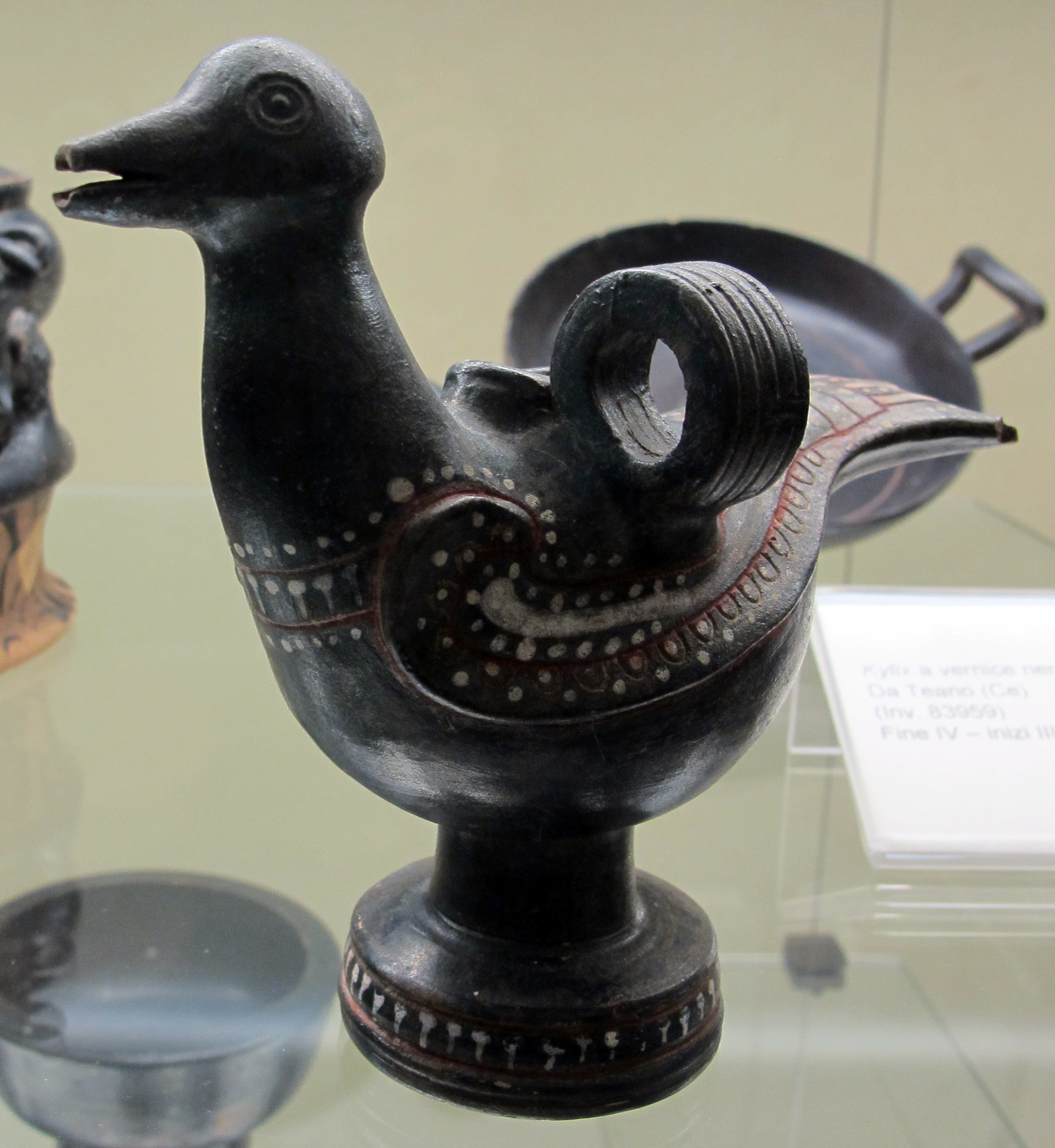 Museo archeologico di Firenze